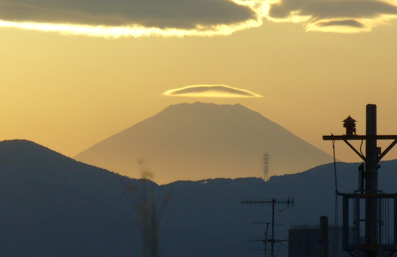 富士山にかかる笠雲（傘雲・レンズ雲）。はなれ笠と呼ばれるタイプ。横浜市より夕刻に望む。